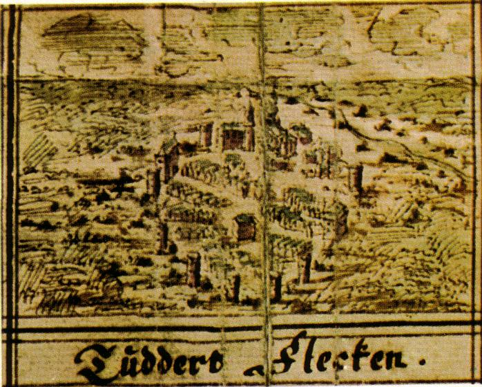 Tüddern